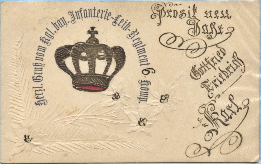 Bayerisches Infanterie-Leib-Regiment, Grußpostkarte, 1912 (eigener Scan von eigener alter Postkarte)